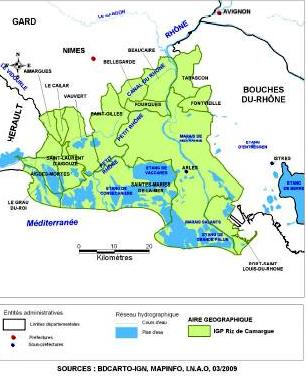 Riz de camargue - Carte IGP. Bleu : plan d'eau, vert : culture du riz de Camargue